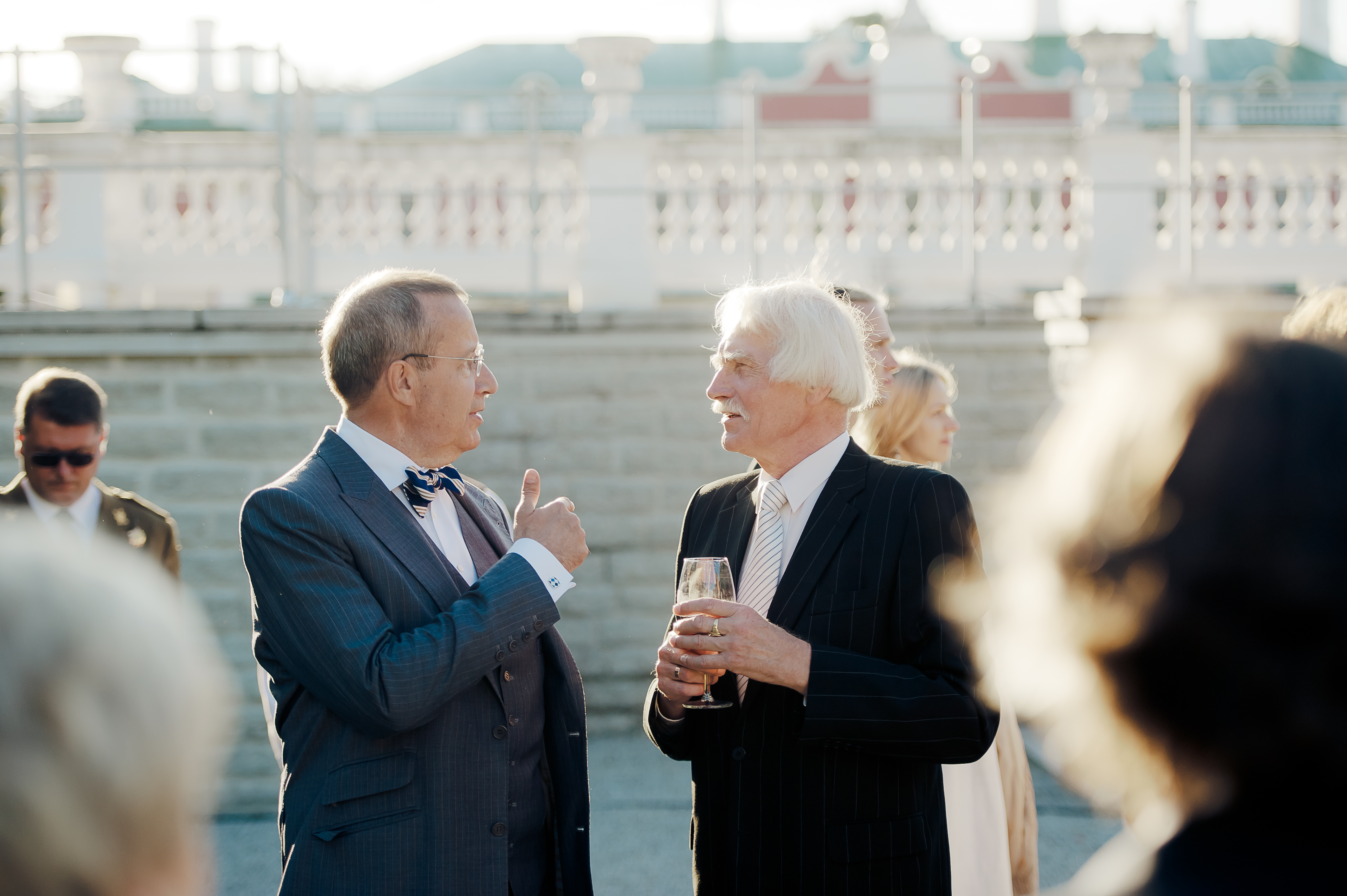 Toomas Hendrik Ilves ja Jüri Kuuskemaa Eesti riikliku iseseisvuse taastamise aastapäeva vastuvõtul augustis 2012.